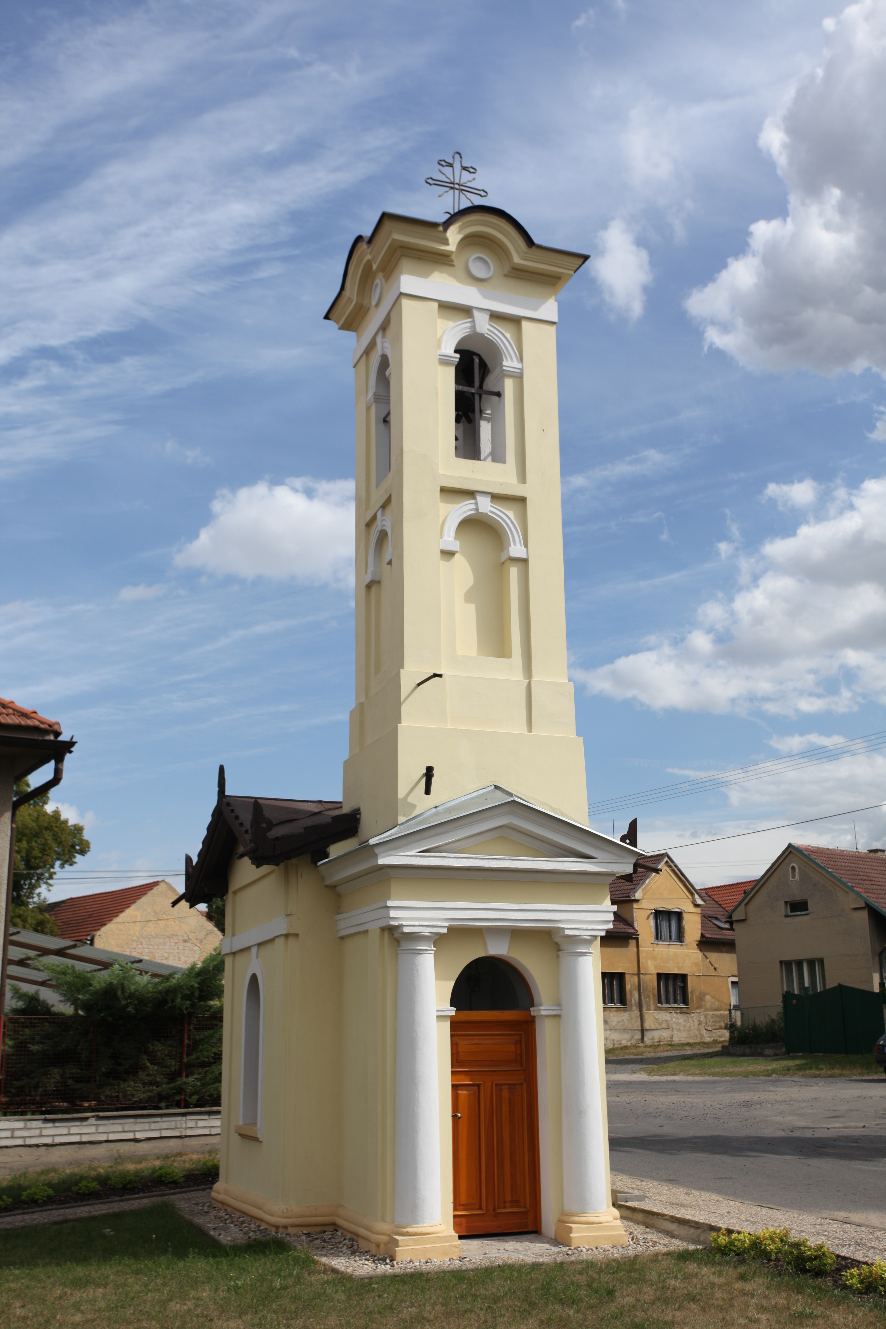 Sudovo Hlavno, kaplička na návsi